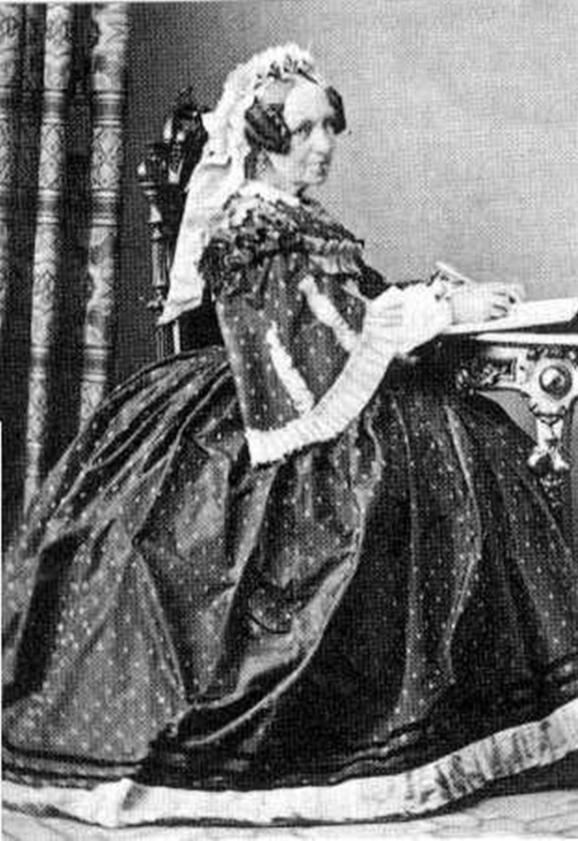 Louise Charlotte von Dänemark (1789-1864), Frau von Wilhelm von Hessen-Rumpenheim